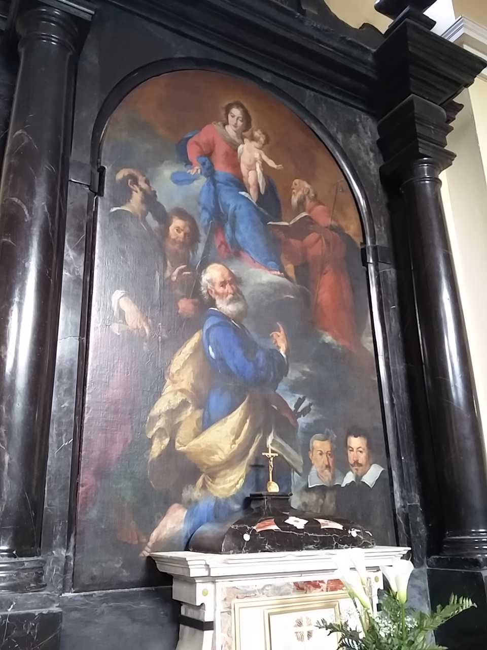 Altare chiesa Tiarno di Sopra